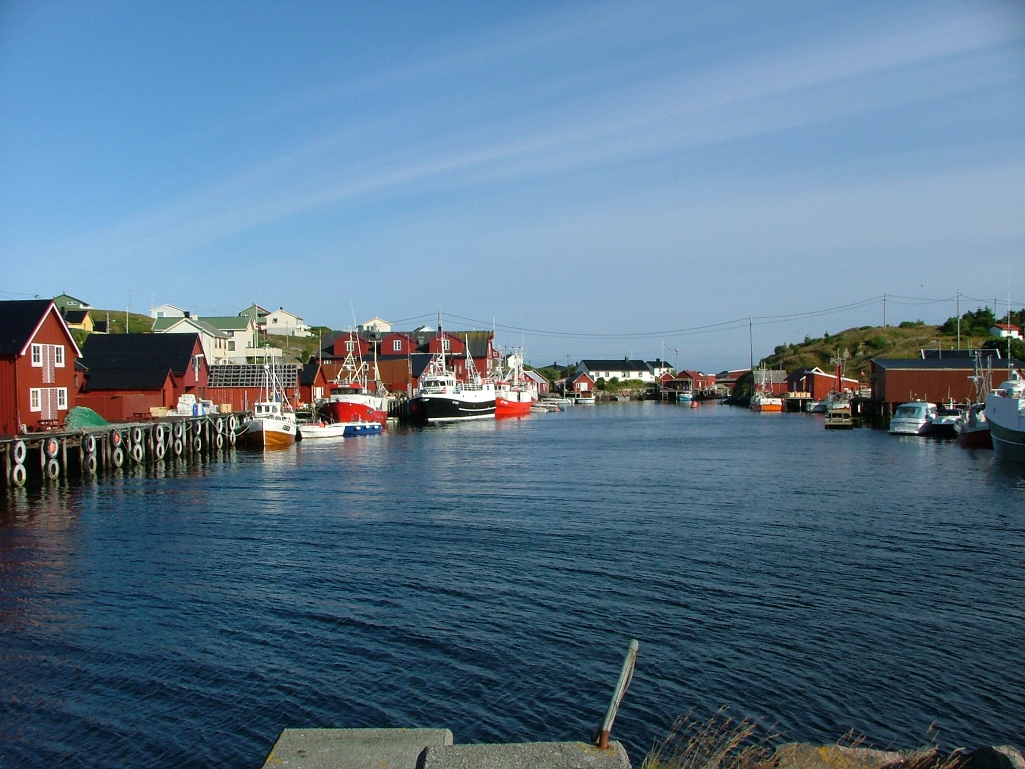 Gårdsøykeila